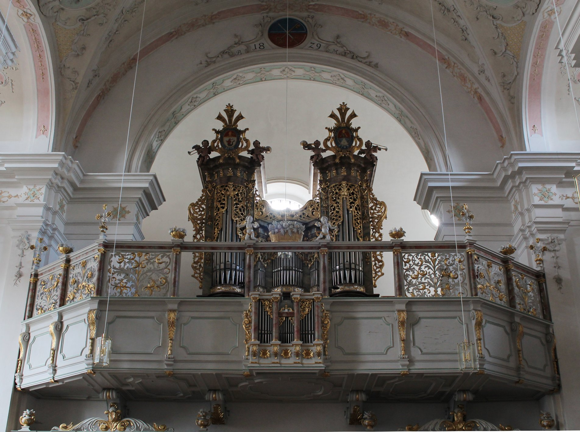 Orgel der Klosterkirche Weyarn (1745, Quirin Weber, II/20)